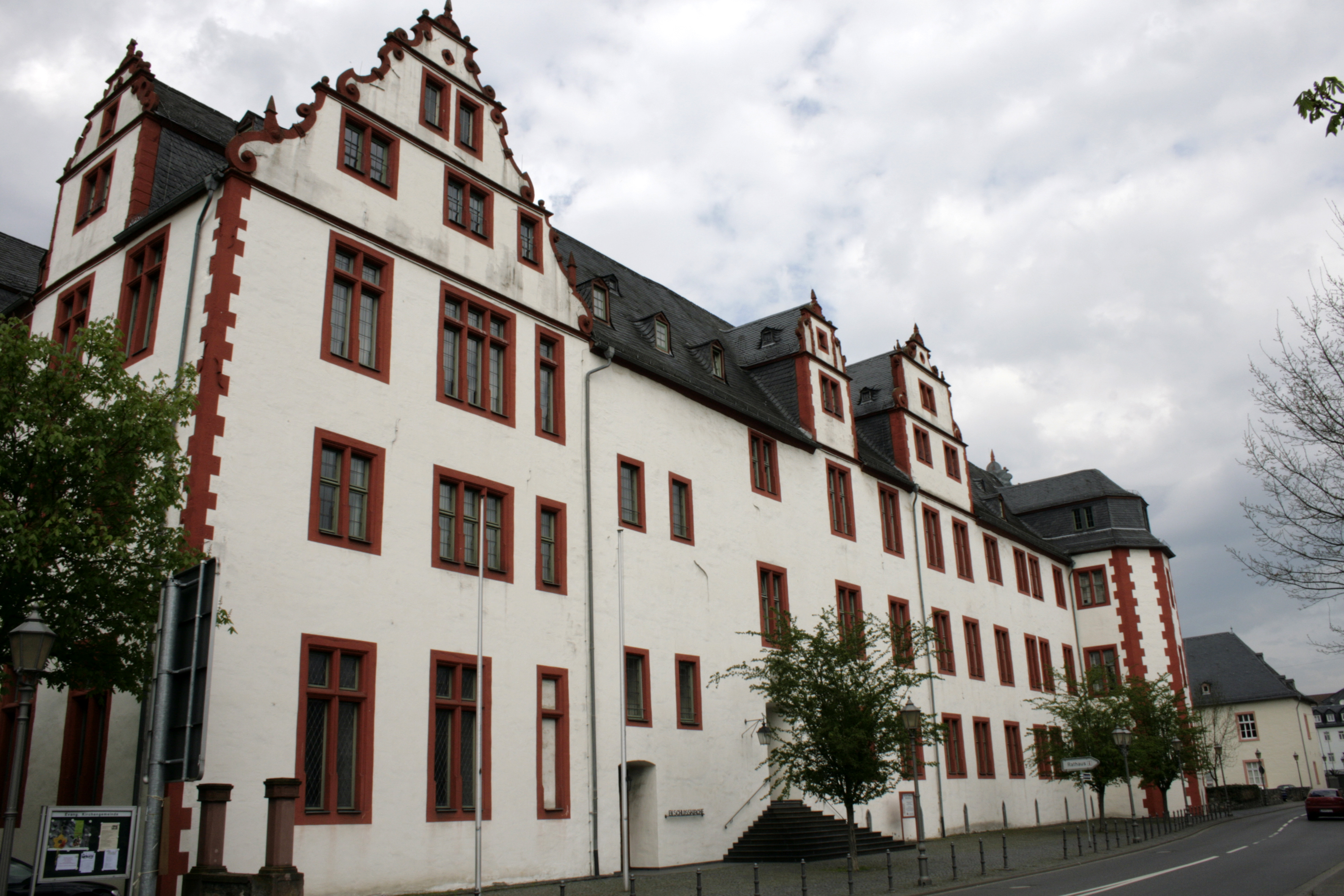 Schloss Hadamar, Straßenfront, Ostflügel, Deutschland